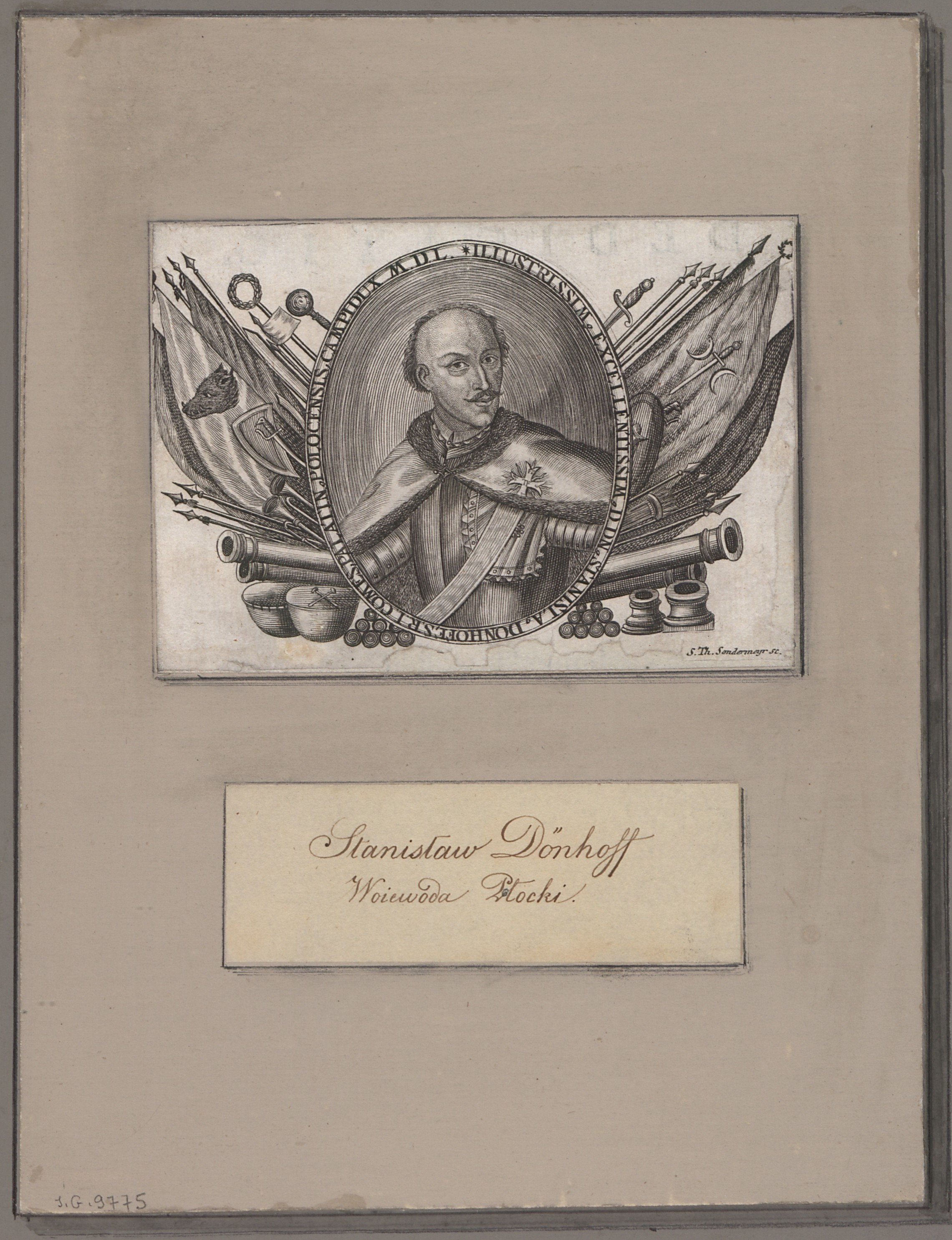 Беларуская (тарашкевіца): Партрэт Станіслава Эрнэста Дэнгафа (Stanisłaŭ Ernest Denhaf)